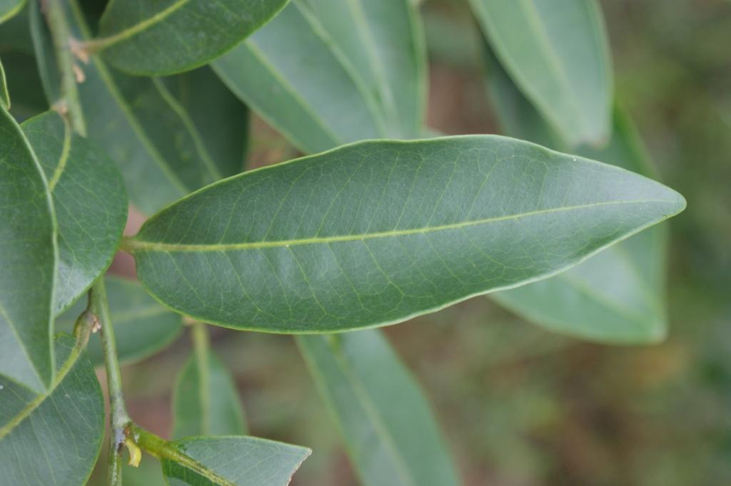 Cardiopetalum calophyllum - ANNONACEAE Parque Estadual da Serra dos Pirineus - Pirenópolis - Goiás - Brasil.